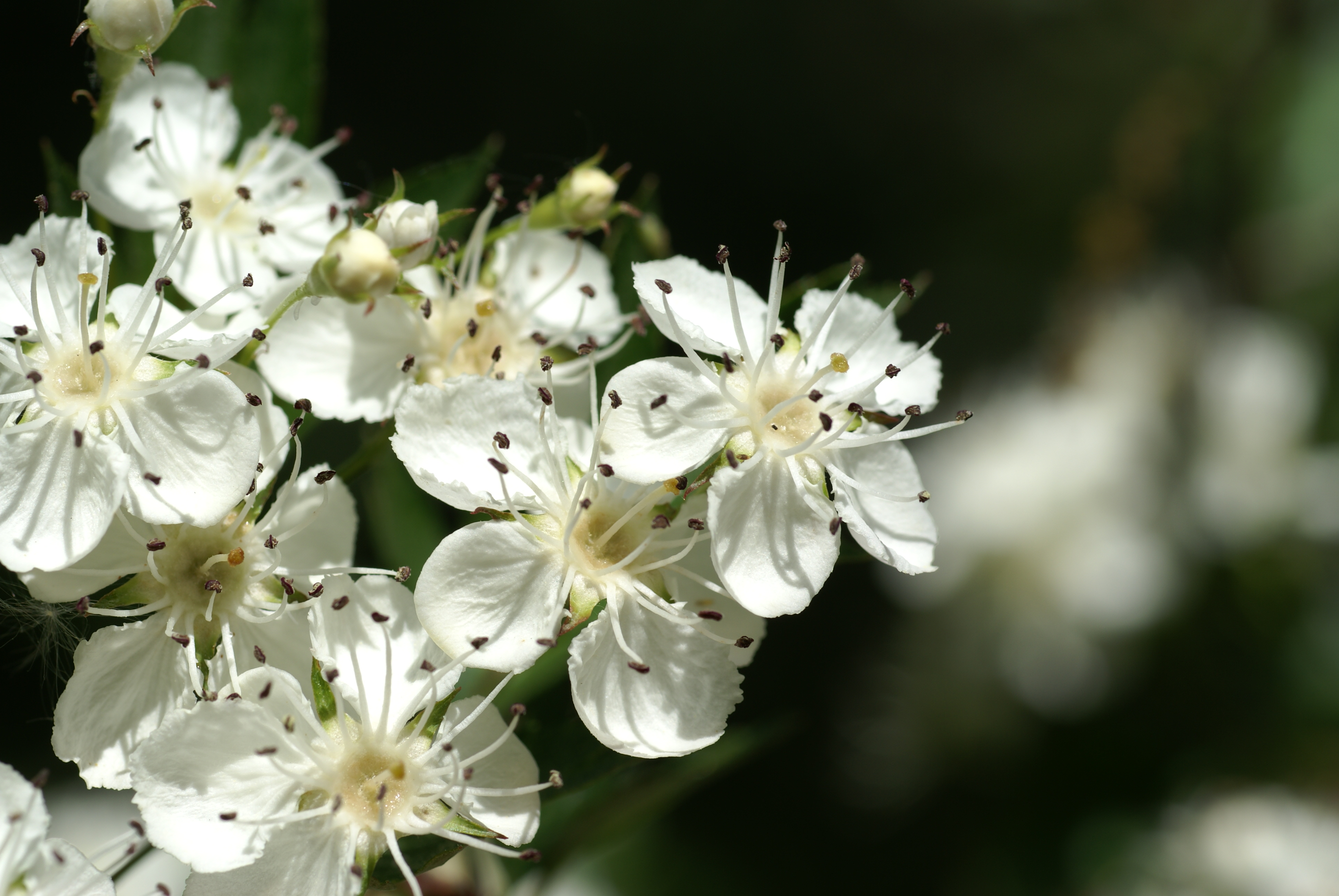 Plant species Crataegus rhipidiphylla